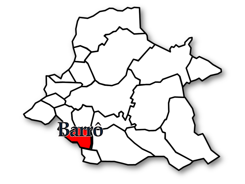 Censos 1864/2011